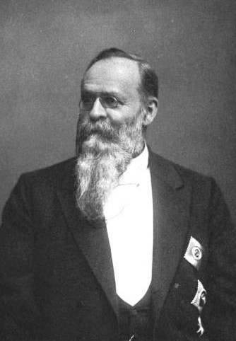 Carl Freiherr von Ledebur (Carl von Ledebur (Theaterintendant), Abbildung in: Neuer Theater-Almnach 1909, Frontispiz